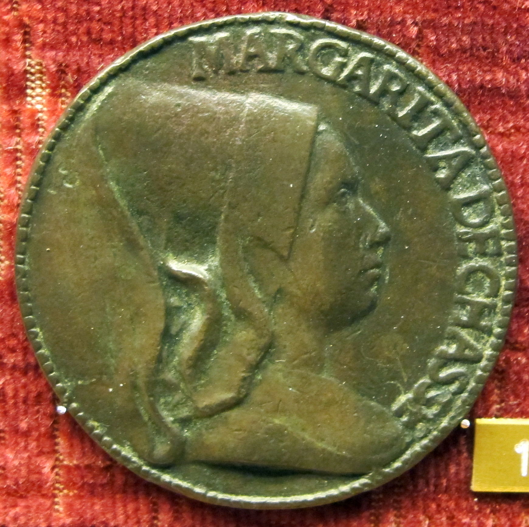 Medaglia di Margherita de Chassey (e Giovanni Carondelet), 1479